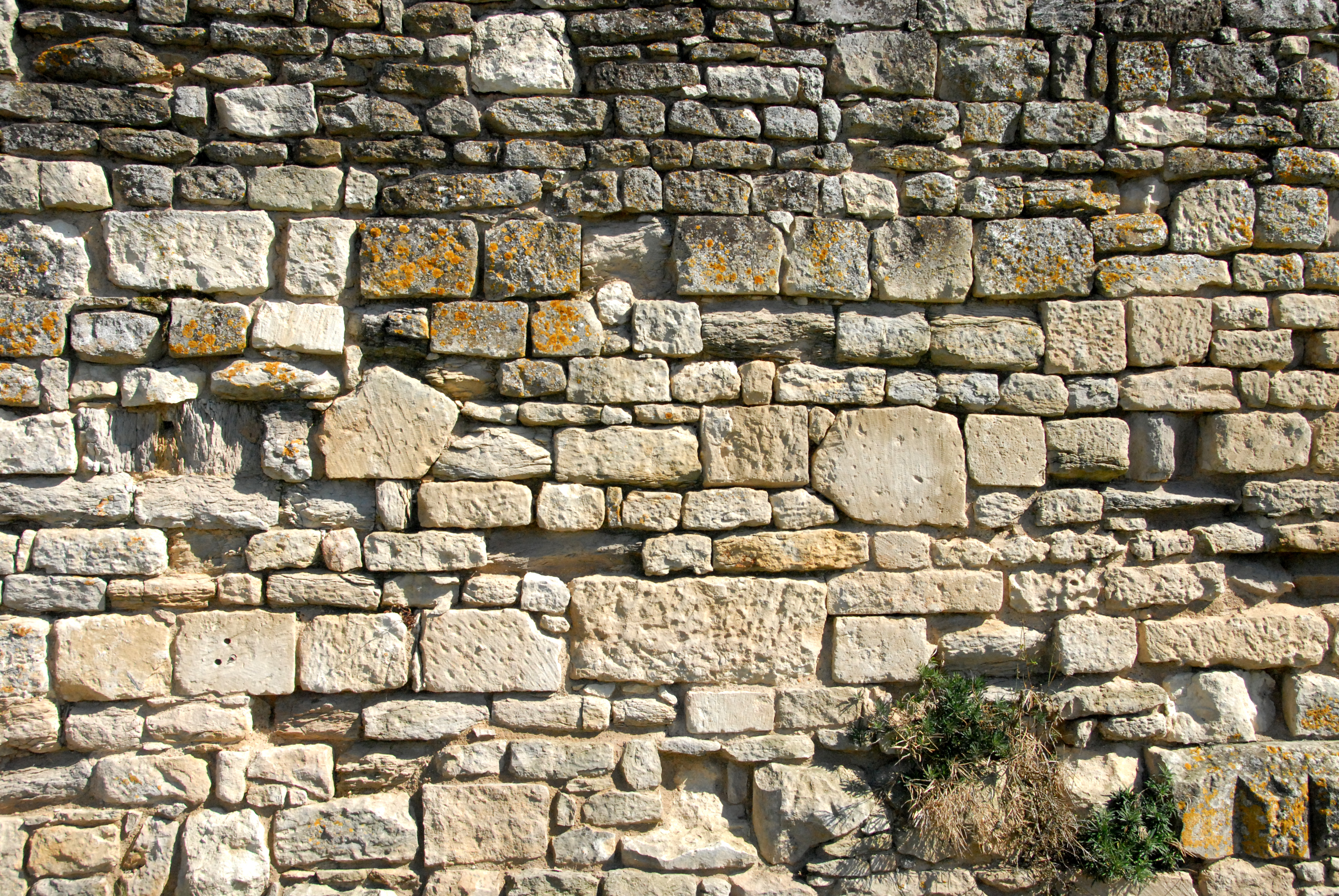 Mauerwerksverband, unregelmässig, Abtei von Maillezais, Frankreich